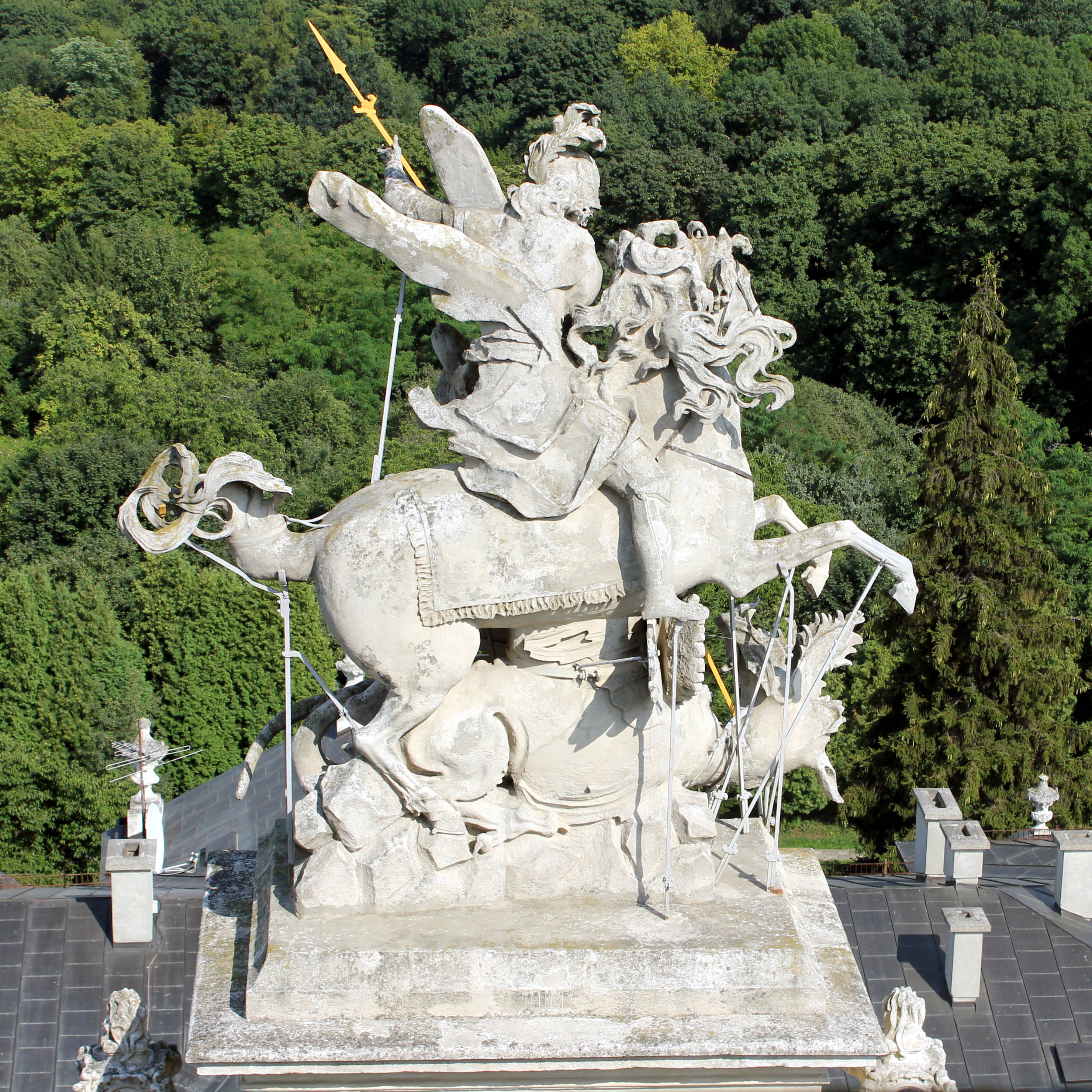 Кінна статуя Юрія-Змієборця на фасаді собору святого Юра у Львові. Скульптор Іван Георгій Пінзель.